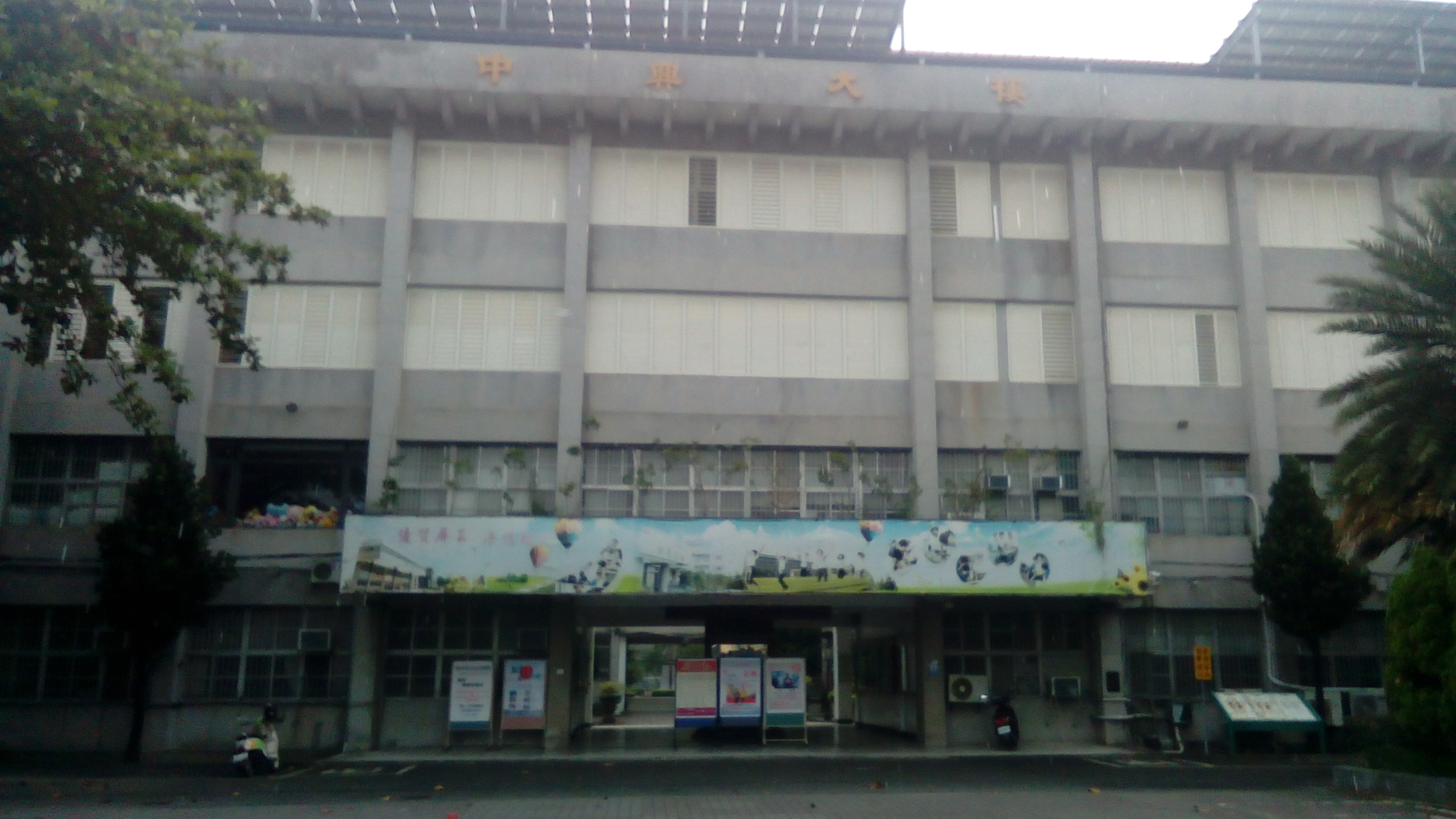 同上 各處室及夜校辦公室皆位於此